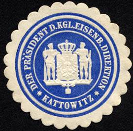 Sealing stamp Title: Der Präsident der Königliche Eisenbahn Direction - Kattowitz Description: blau, weiß, geprägt Place: Kattowitz size: 4 cm